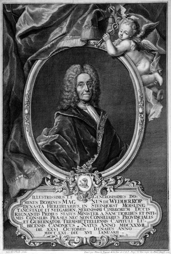 Magnus von Wedderkop (* 26. Oktober 1637; † 16. Januar 1721), Rechtsgelehrter, schleswig-holsteinischer Staatsmann und Politiker